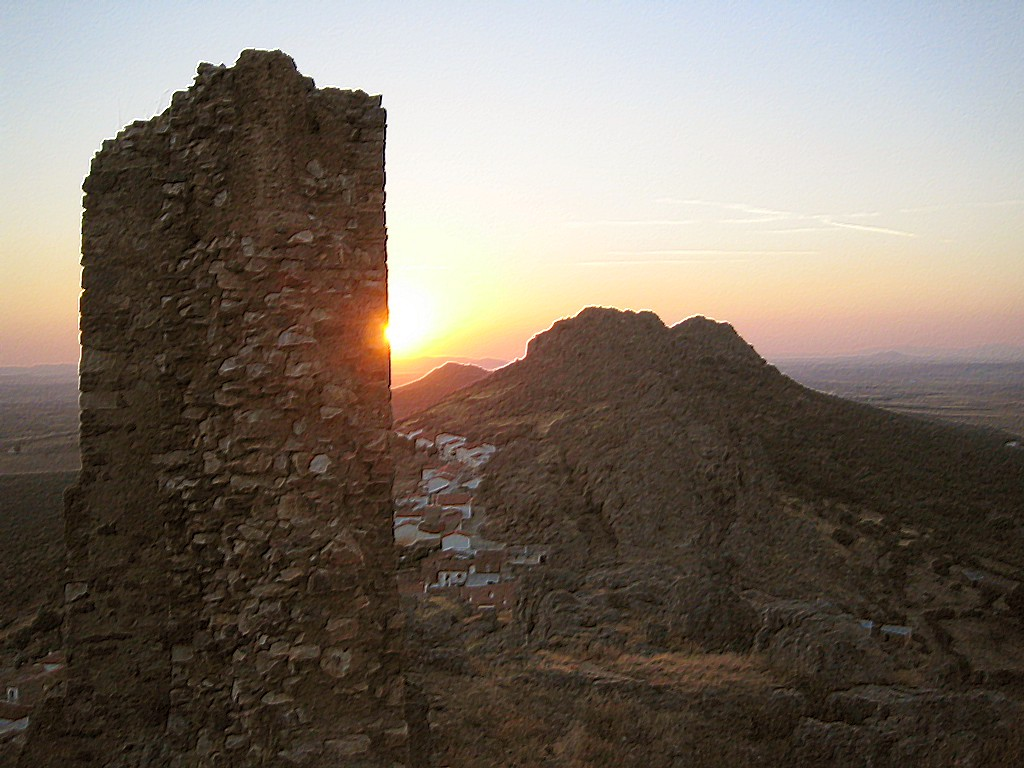 Benquerencia de la Serena